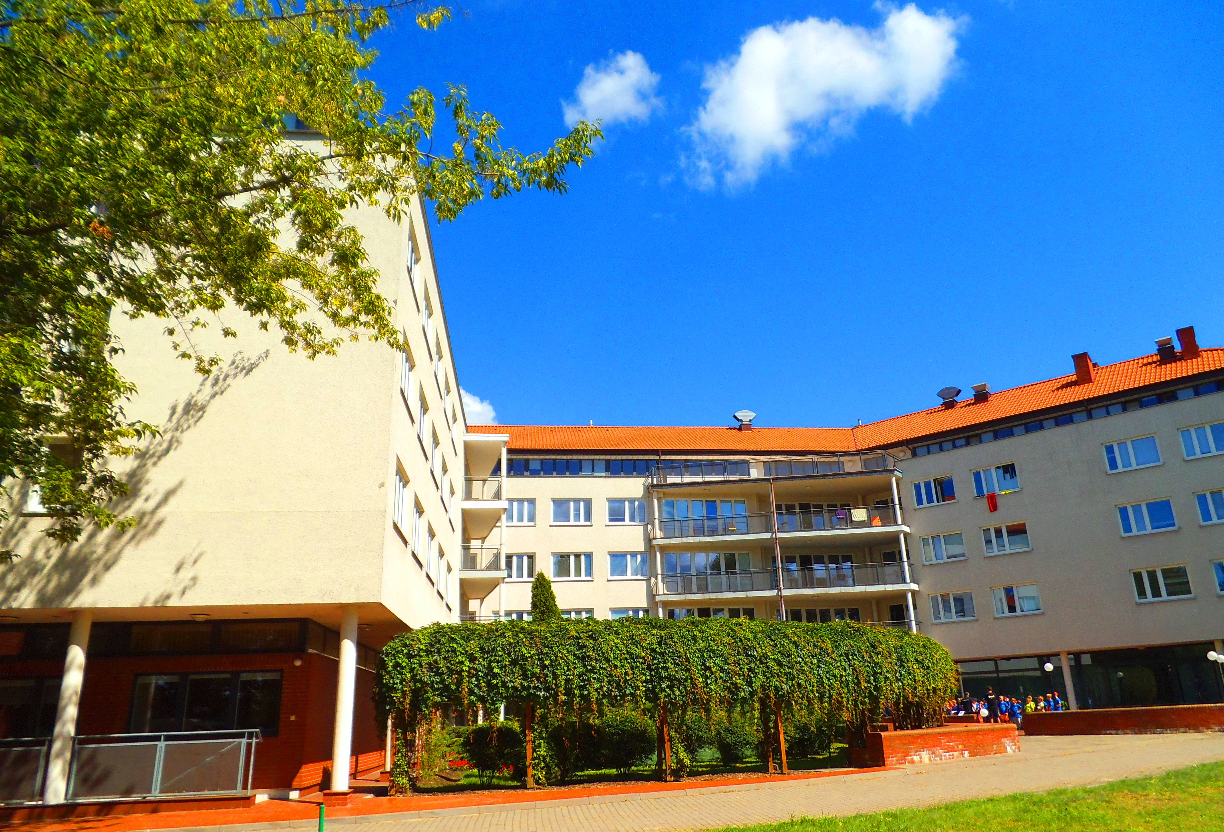 Gimnazjum i Liceum Akademickie w Toruniu, Internat